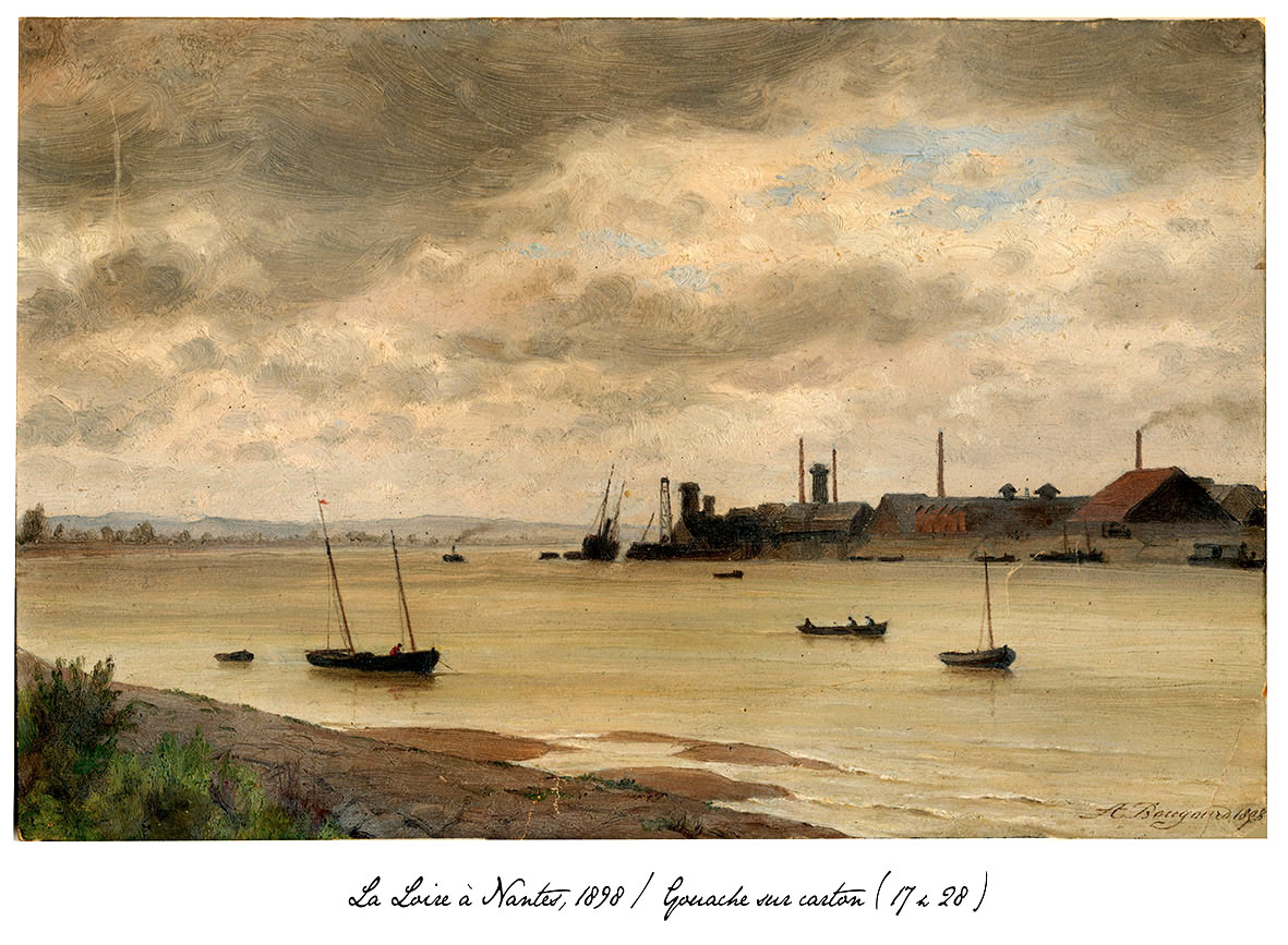 La Loire près de Nantes en 1898 avec trois petits bateaux et sur la rive opposée, des bâtiments industriels.